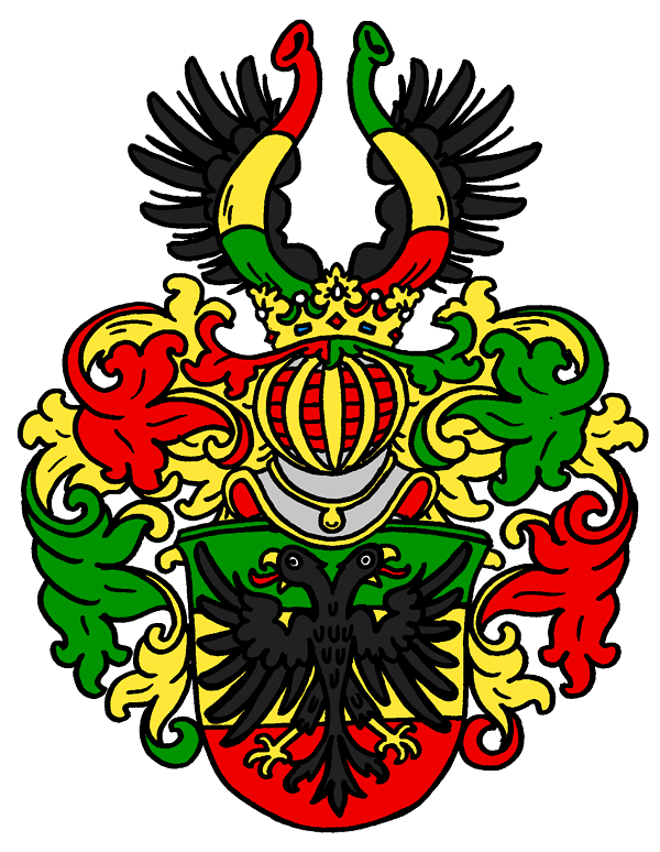 Wappen derer von Bröm(b)se(n)